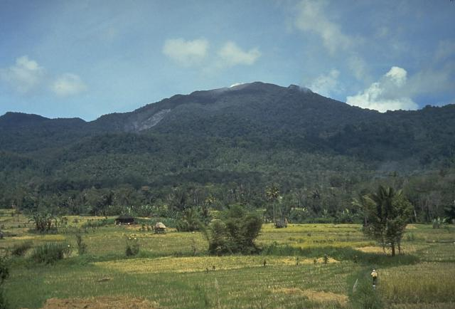 Forested stratovolcano Sorikmarapi in Indonesia.